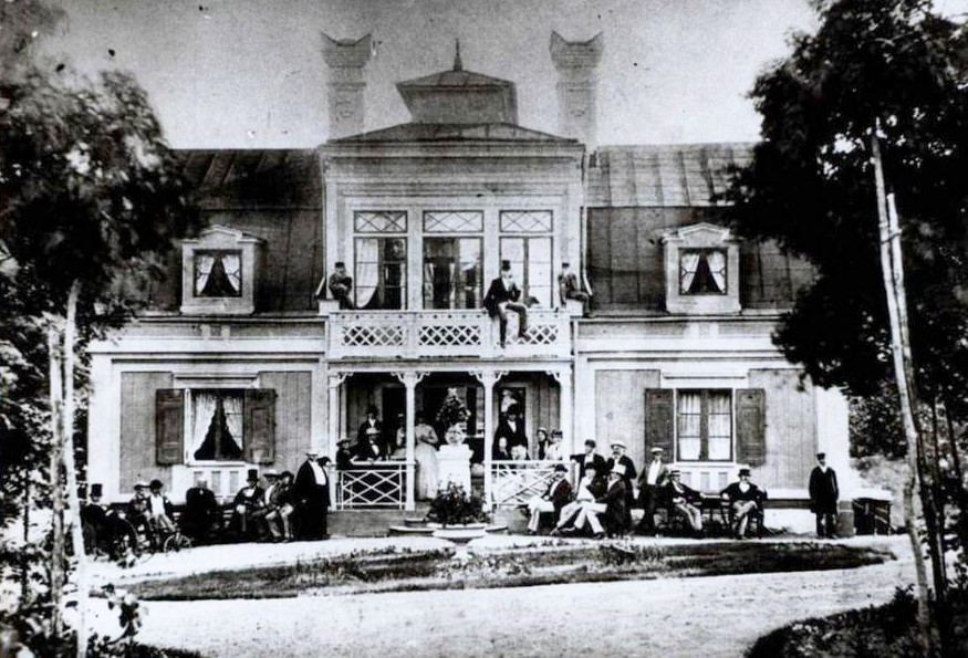 Villa Inverness "Slottet"